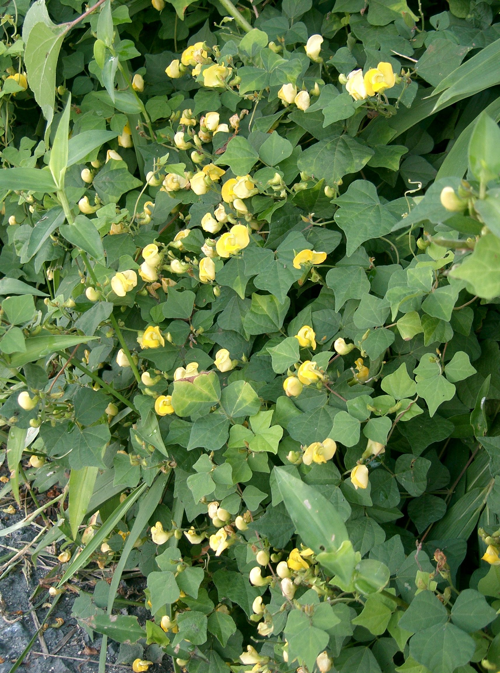 Dunbaria villosa